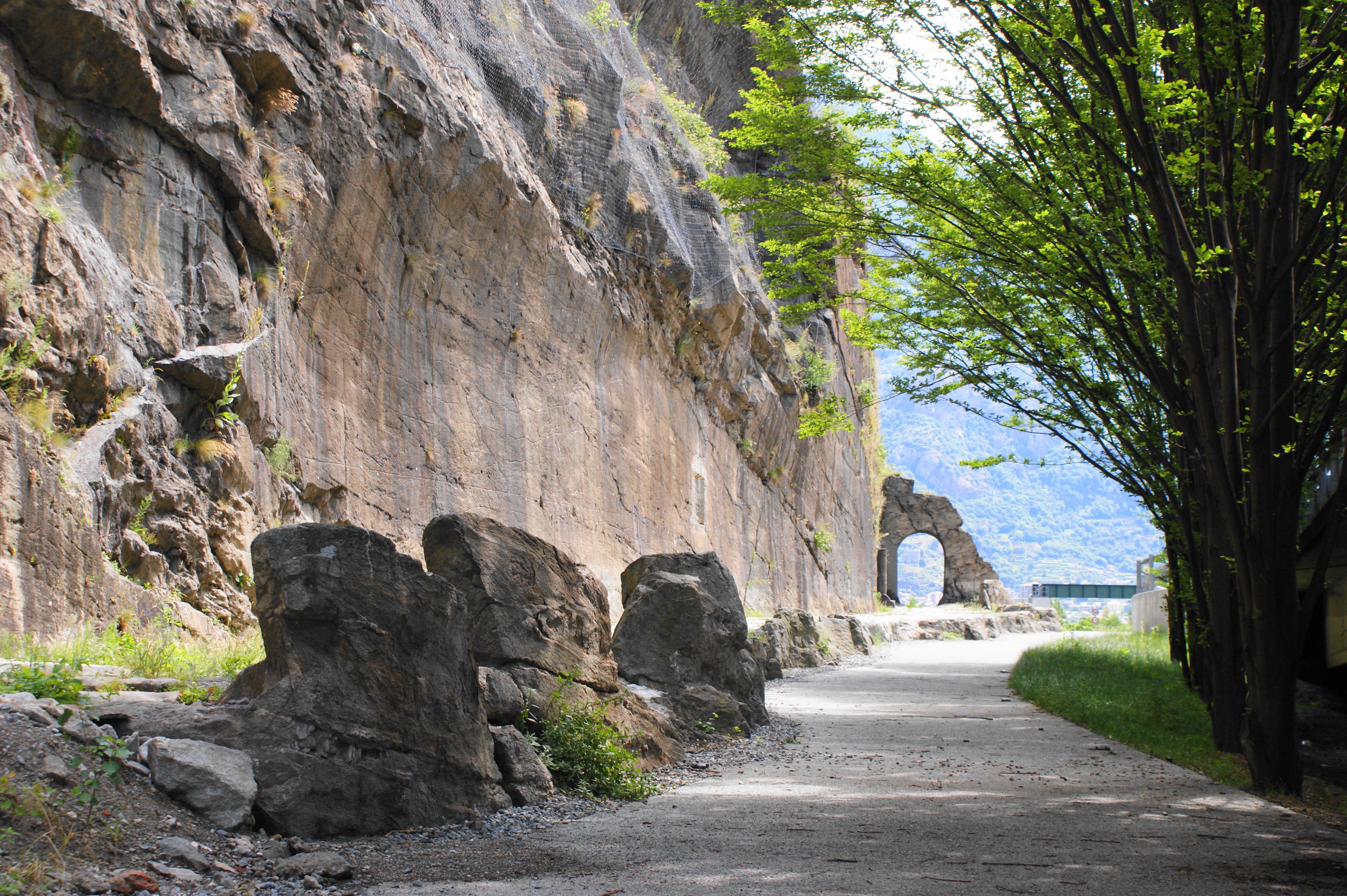 Tratto della via consolare delle Gallie This is a photo of a monument which is part of cultural heritage of Italy.